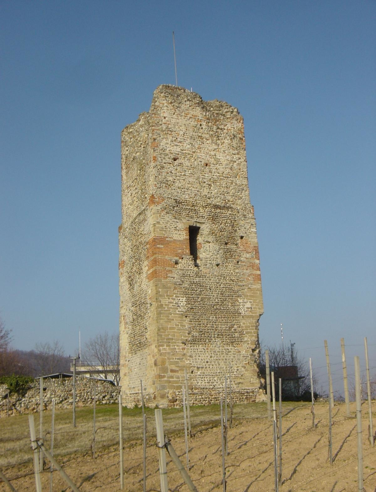 Gattinara: Torre delle Castelle. Foto by Delpo DJ